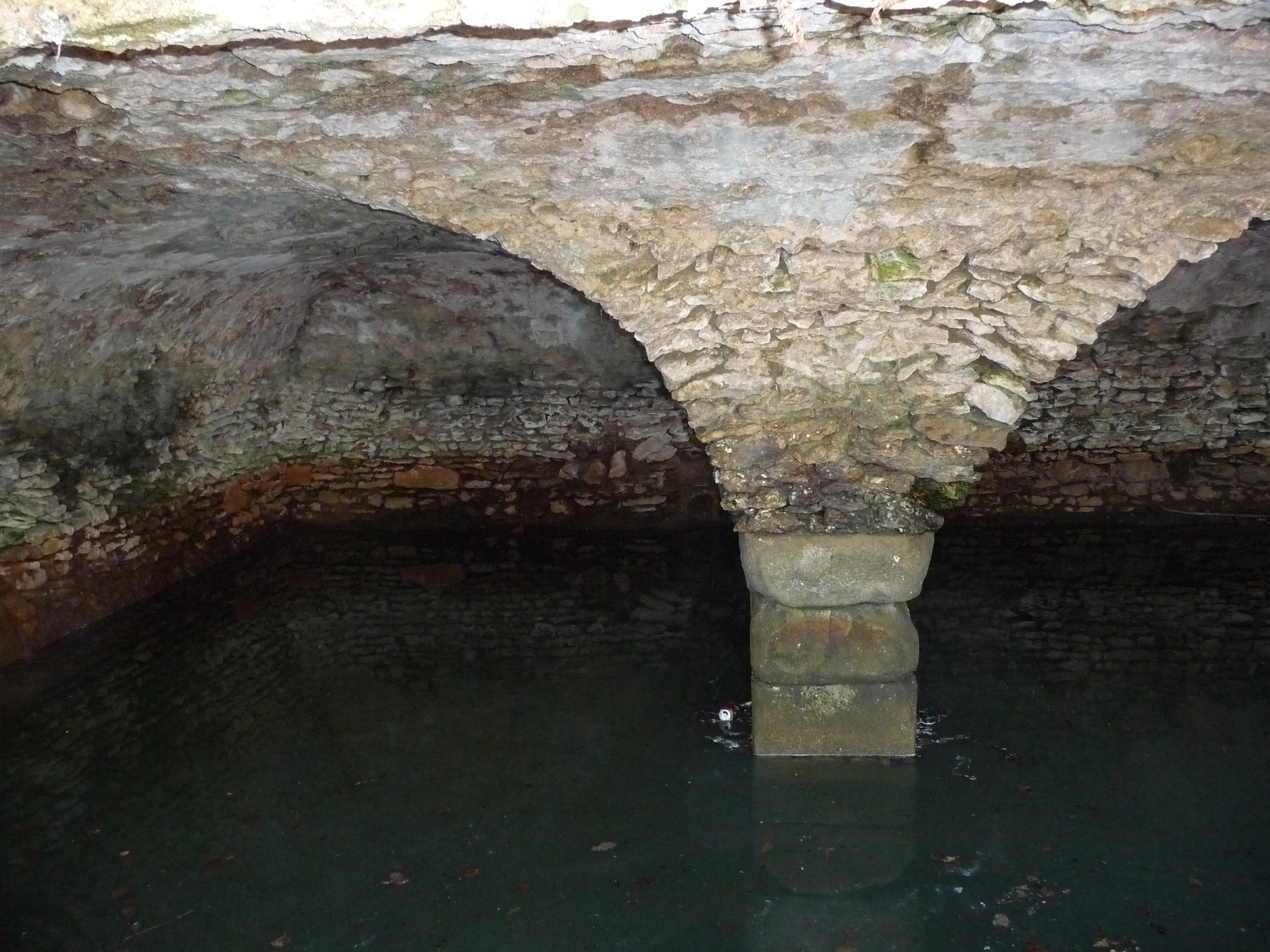 citerne de la muette XIe ou XIIe siècle commune de St-Léger-en-Yvelines